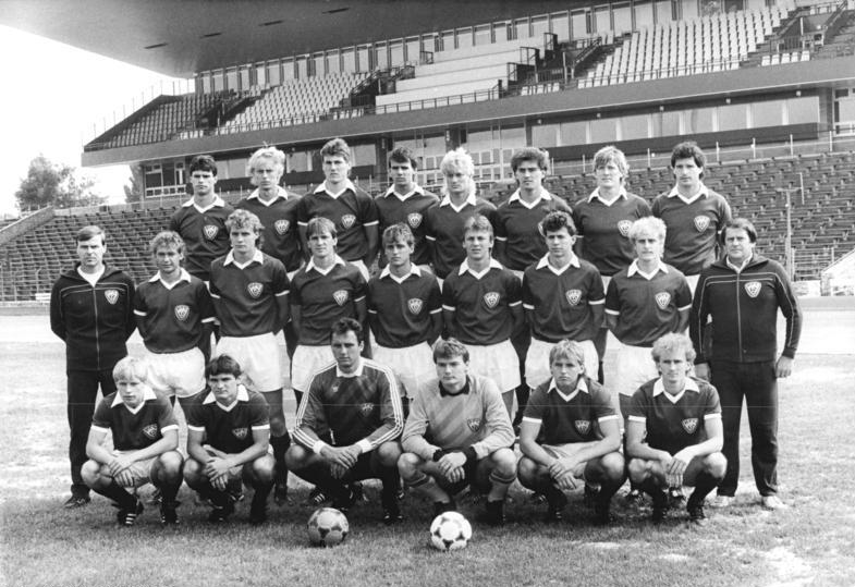 ADN-ZB-Oberst-17.7.87-ma-Berlin: Fußball-Oberligasaison 1987-88. Die Mannschaft des neunfachen DDR-Meisters BFC Dynamo. Vorn von links: Jörg Fügner, Thomas Grether, die Torhüter Bodo Rudwaleit und Marco Kostmann, Marco Köller und Heiko Brestrich. Mittlere Reihe von links: verantwortlicher Trainer Jürgen Bogs, Waldemar Ksienzyk, Hendrik Herzog, Frank Rohde, Thomas Doll, Andreas Thoma, Eike Küttner, Christian Backs und Trainer Joachim Hall. Hintere Reihe von links: Bernd Schulz, Rainer Ernst, Burkhard Reich, Dirk Anders, Michael Schulz, Frank Pastor, Norbert Trieloff und Rainer Troppa.